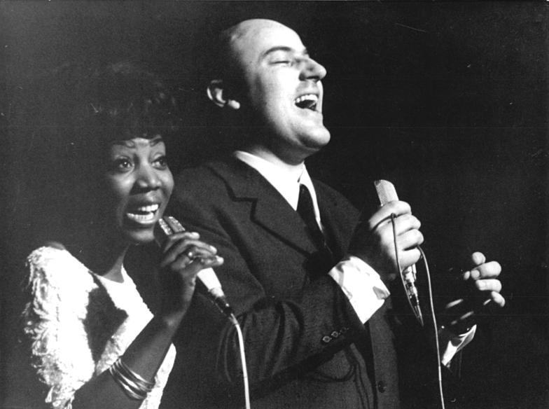 Zentralbild-Franke-25.3.70-pe-Berlin: Manfred Krug und Etta Cameron waren die Solisten eines Jazz-Konzerts am 24.3.70 im Berliner Friedrichstadtpalast. Mit dem Klaus-Lenz-Orchester boten die beiden beliebten Interpreten Schlager, Soul, Jazz, Beat, Songs und Lieder aus der Oper "Porgy and Bess" dar. Dieses erste öffentliche Konzert der beiden Künstler wird am 29.3.70 wiederholt."